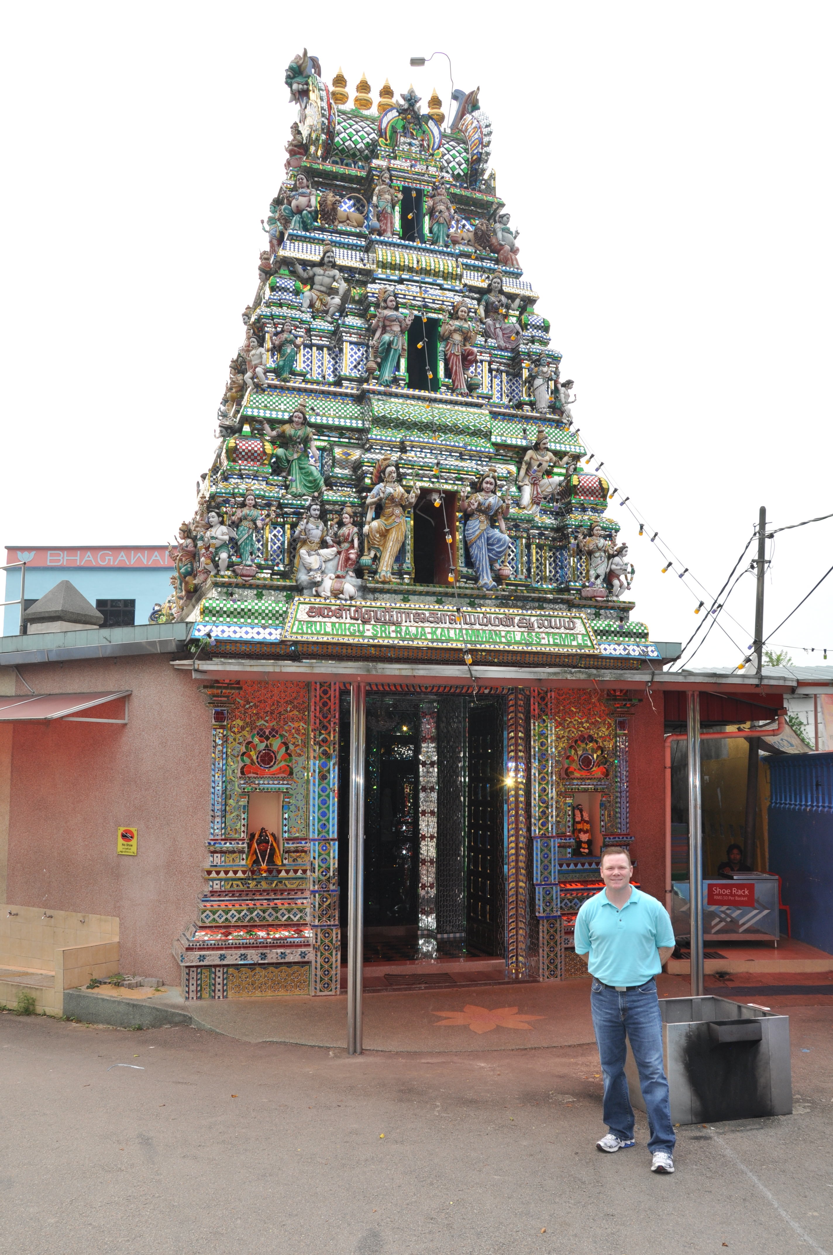 Arulmigu Sri Rajakaliamman